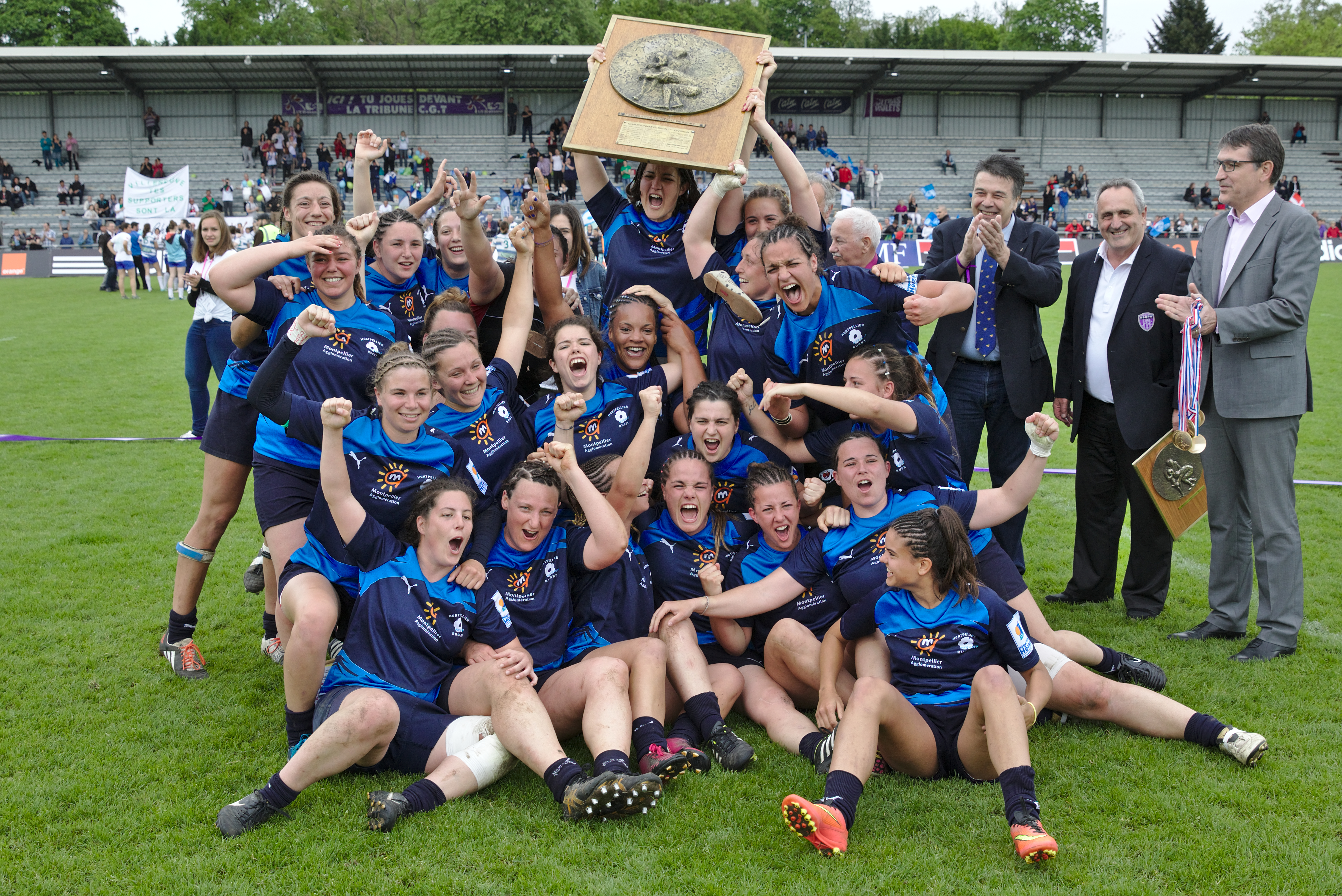 Rugby féminin. Finale Top 8 (2015) : MHR vs Lille (2 mai 2015) à Bourg-en-Bresse (stade Verchère)..